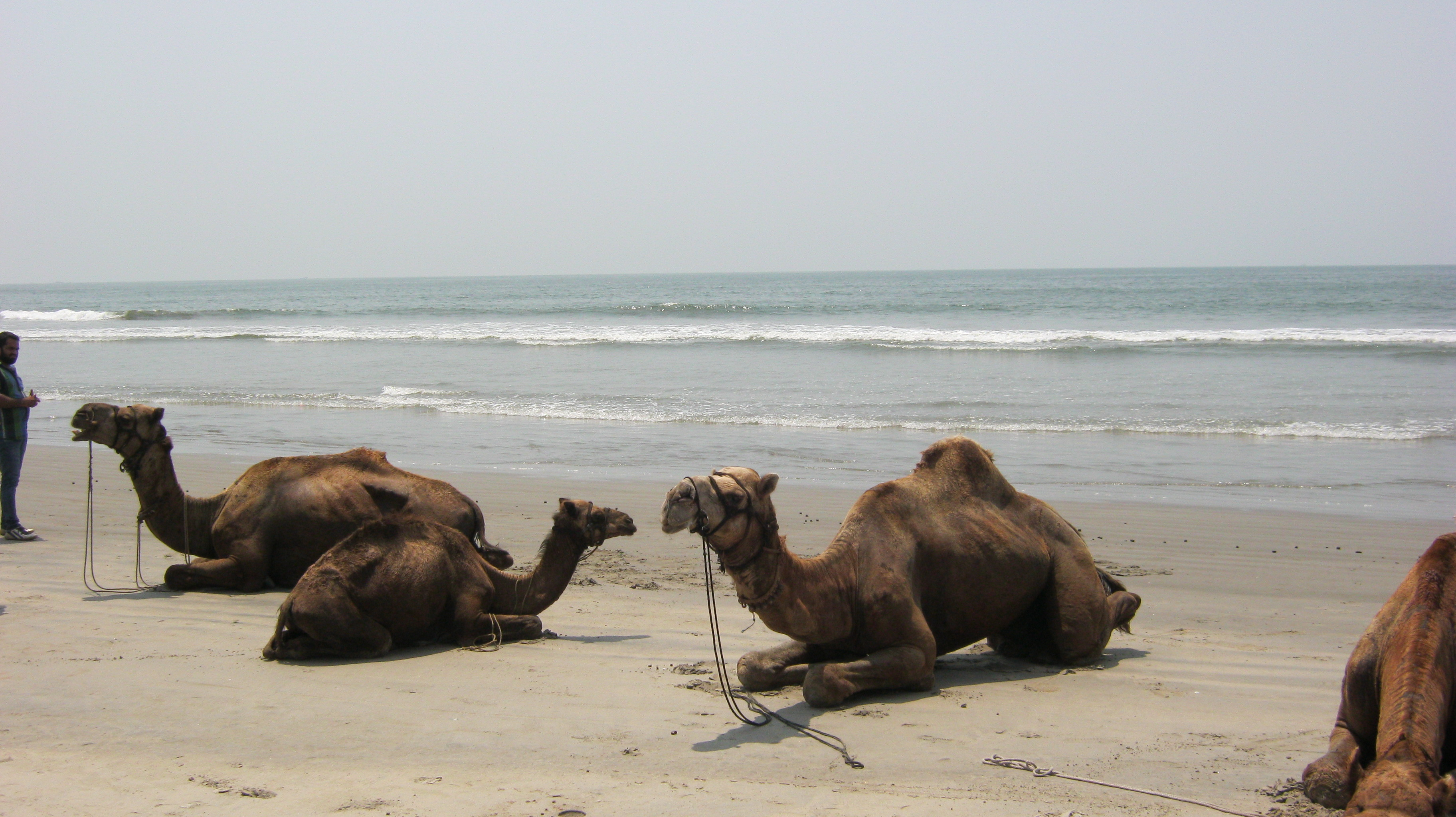 ഒട്ടകം